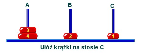 Sytuacja gdy zastajemy układ w trakcie układania na zadany stos i chcemy kontynuować układanie.